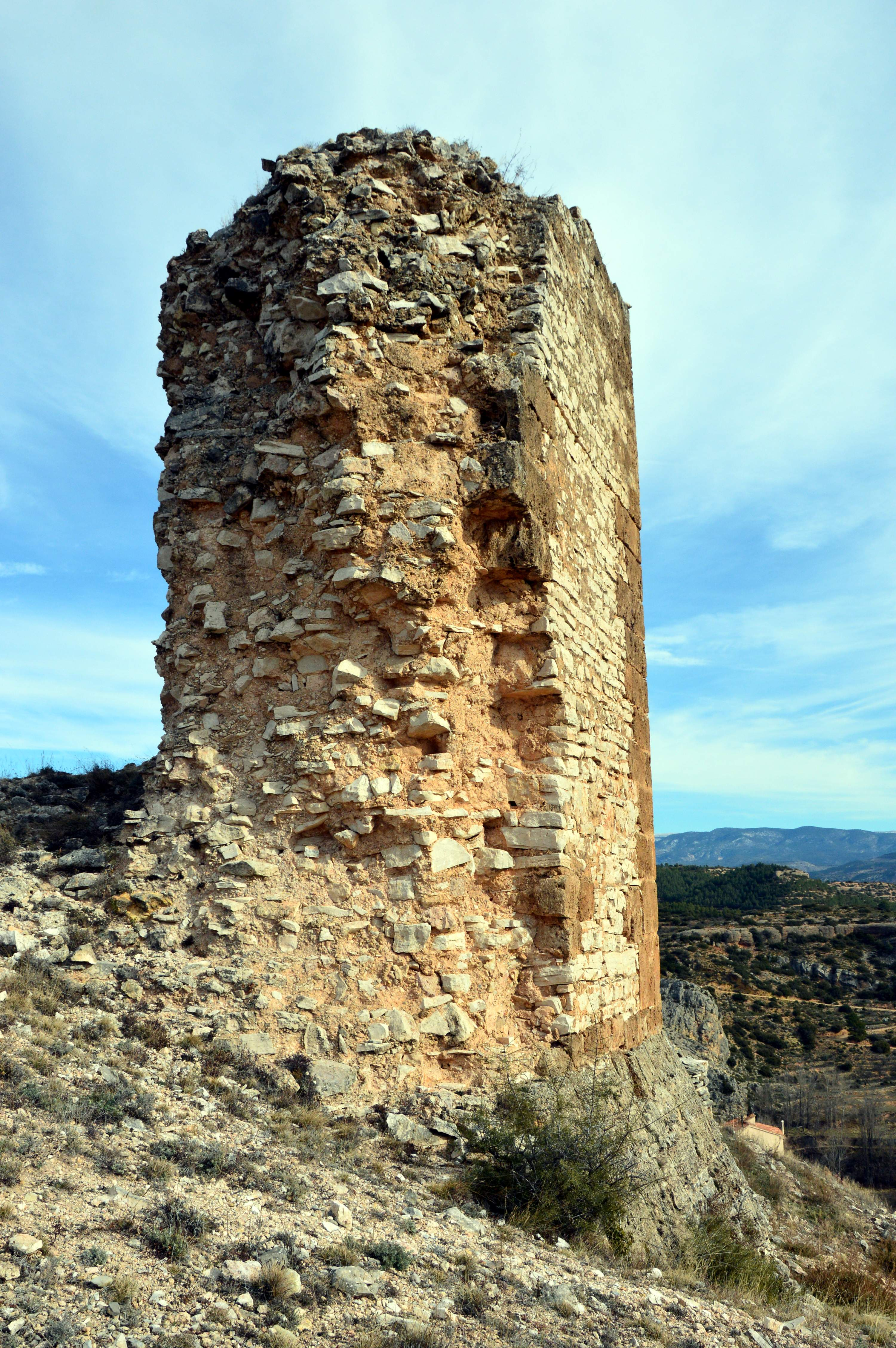 Detalle del torreón de La Torreta en Castielfabib (Valencia), perteneciente al recinto amurallado de la villa por occidente (2019).